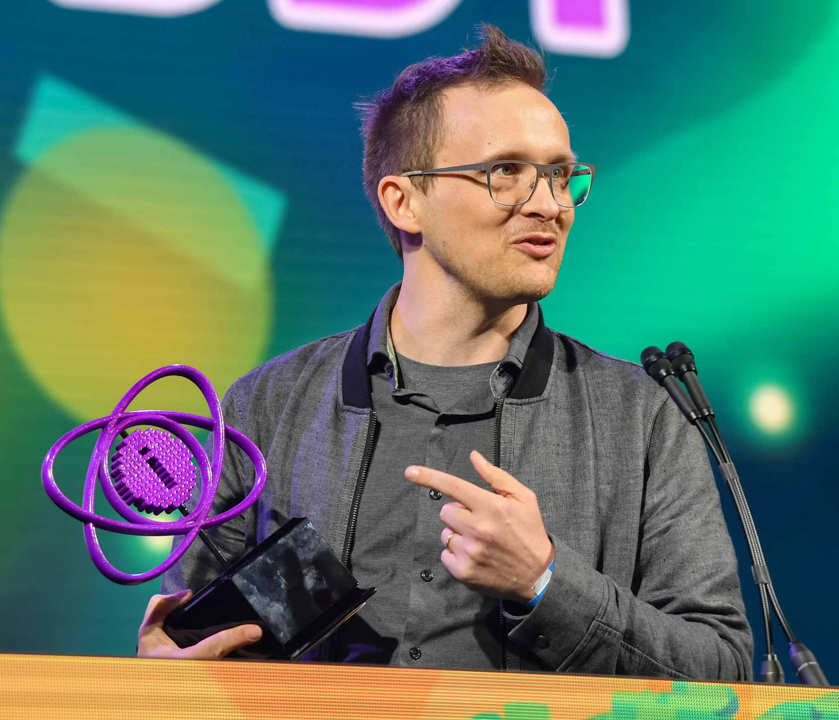 D5X_8219